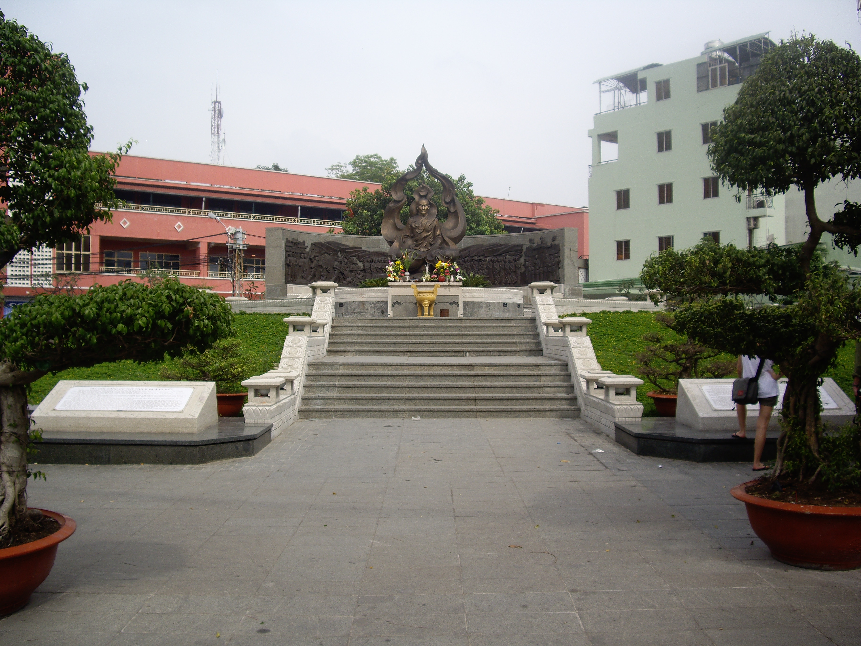 2010 image of the Saigon intersection where Thích Quảng Đức performed his self-immolation, Phan Đình Phùng (now Nguyễn Đình Chiểu) Street runs NE-SW and Lê Văn Duyệt (now Cách Mạng Tháng Tám) Street runs NW-SE. s - Google Maps - Google Earth